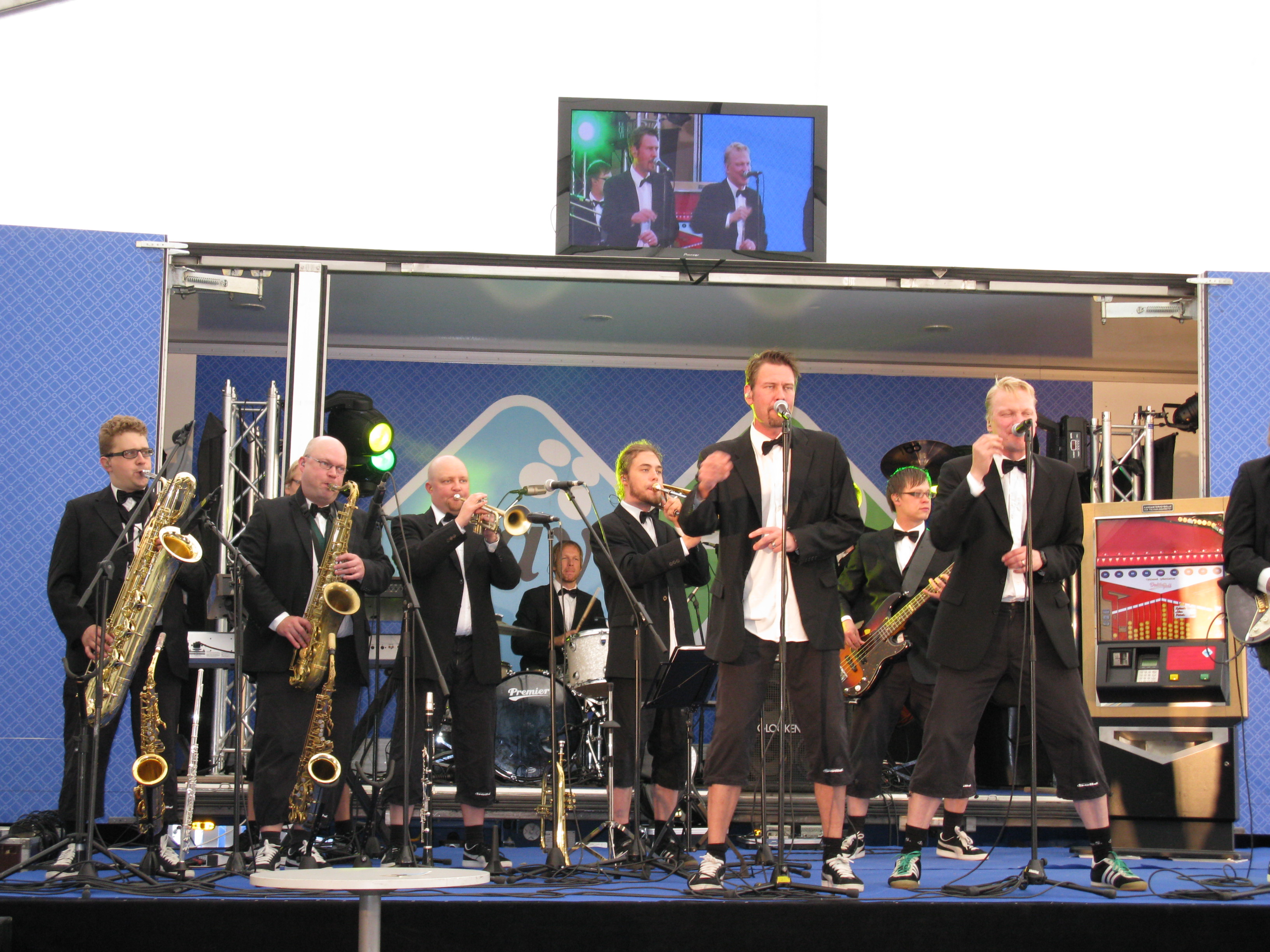 Jean S. on vuonna 1991 perustettu suomalainen yhtye.